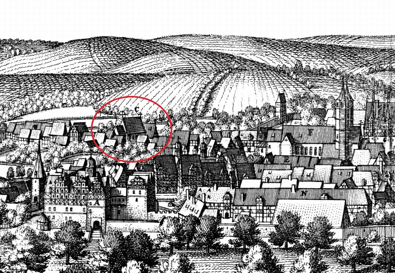 Ausschnitt aus Merians Stadtansicht von Gandersheim; rot markiert das Marienkloster